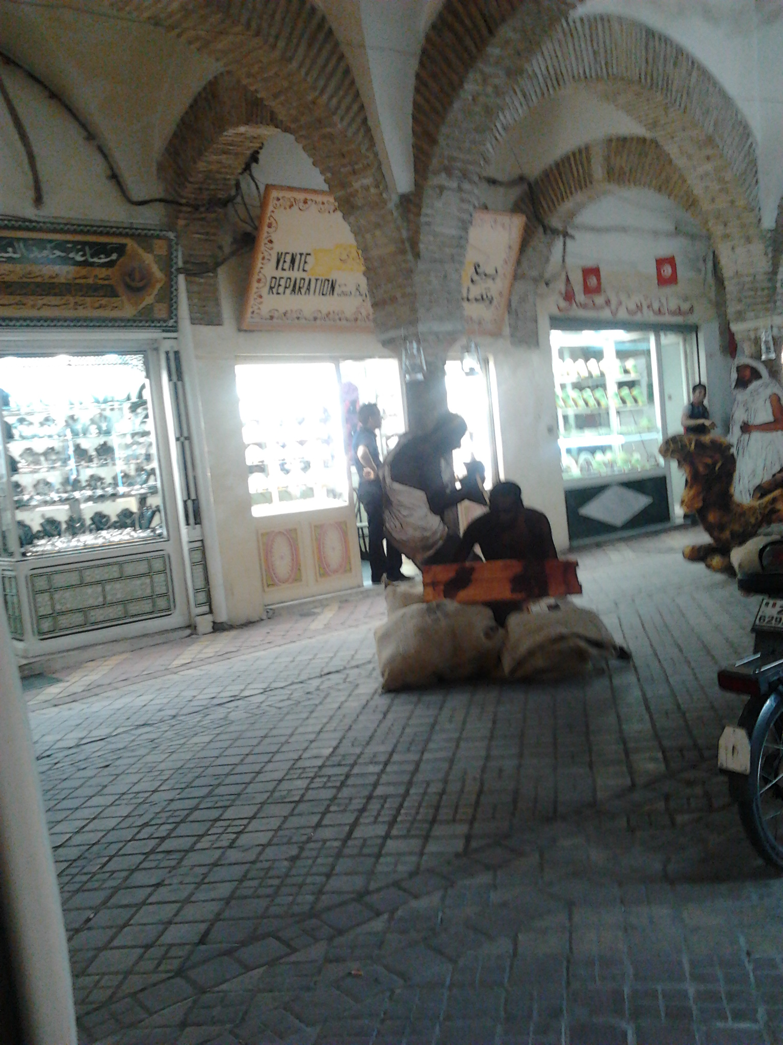 Souk El Berka - reconstitution d'une scène de vente d'esclave lors de l'evennement culturel "Dream city"